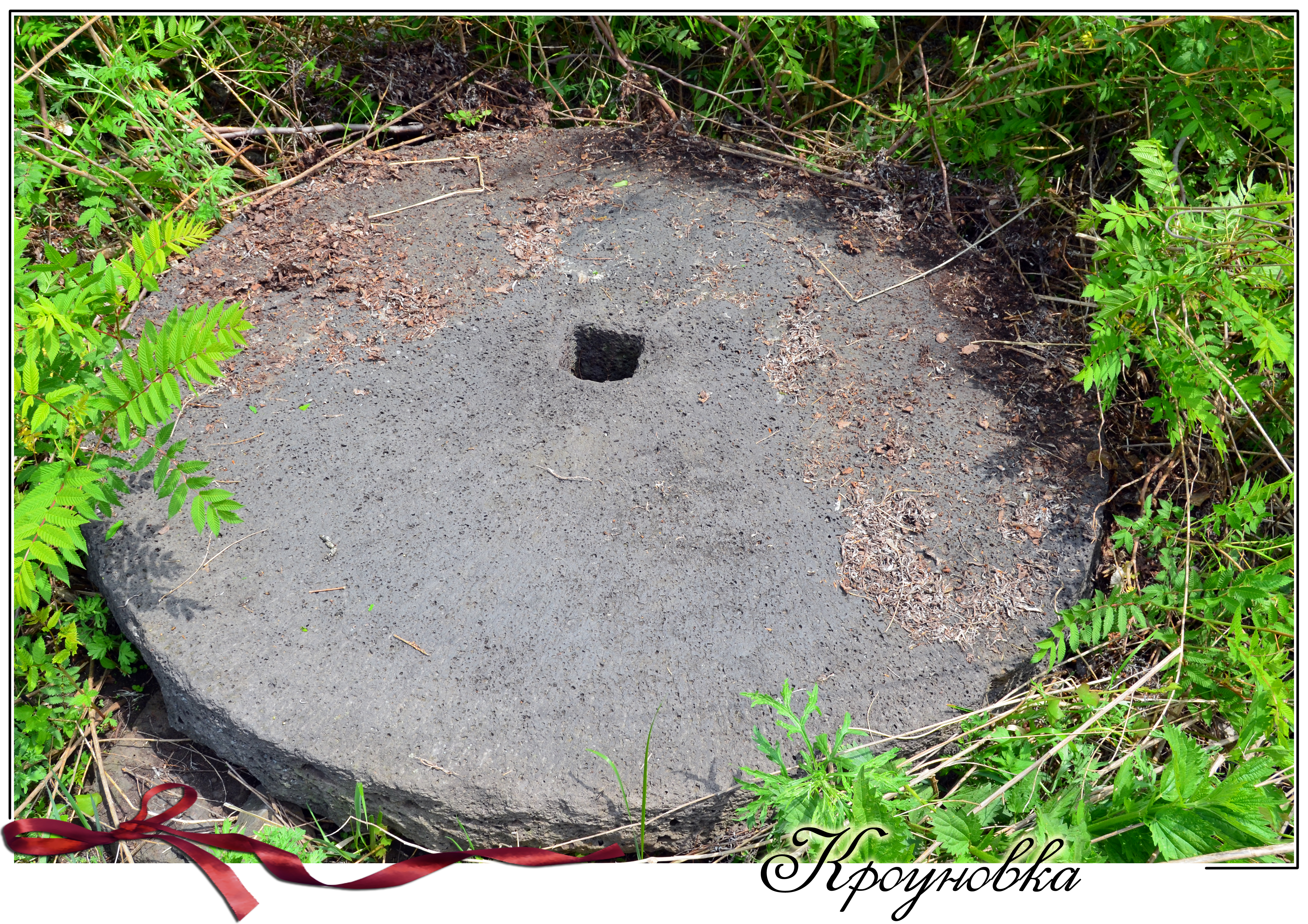 Жёрнов корейских переселенцев в лесу.